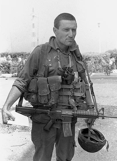 סא"ל דורון אלמוג במלחמת לבנון הראשונה